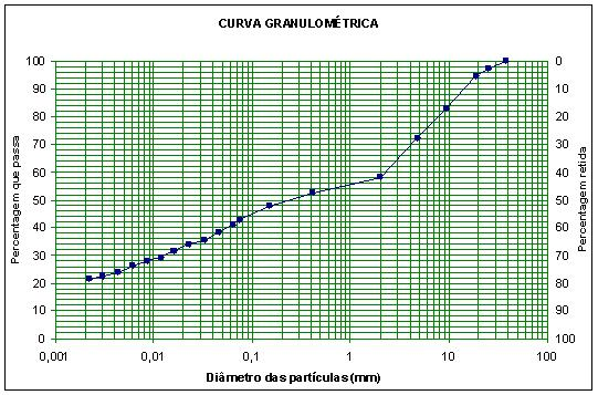 Exemplo de Curva Granulométrica gerada no excel